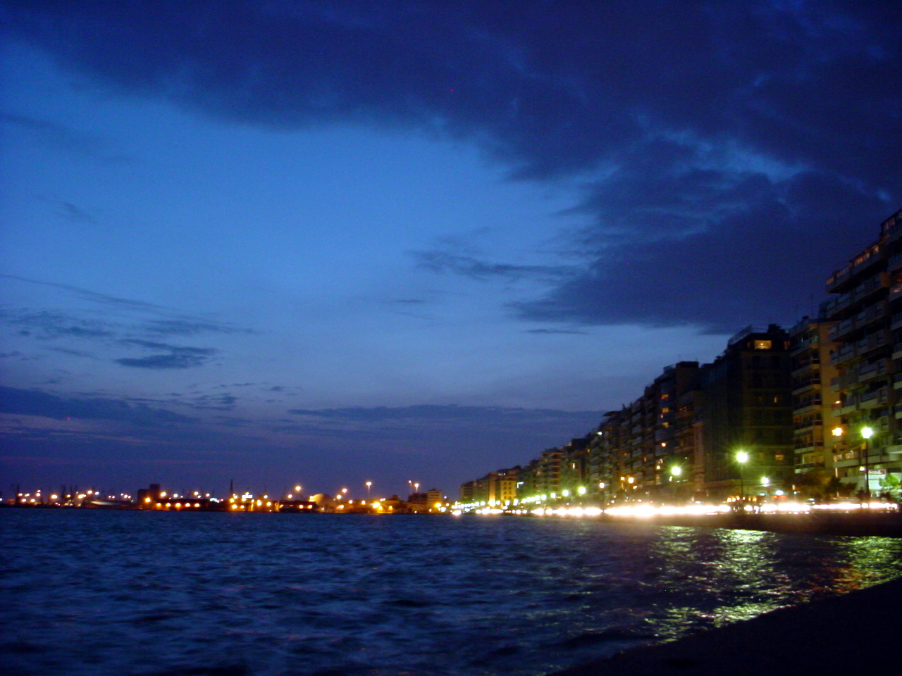 Golfo de Tesalonica